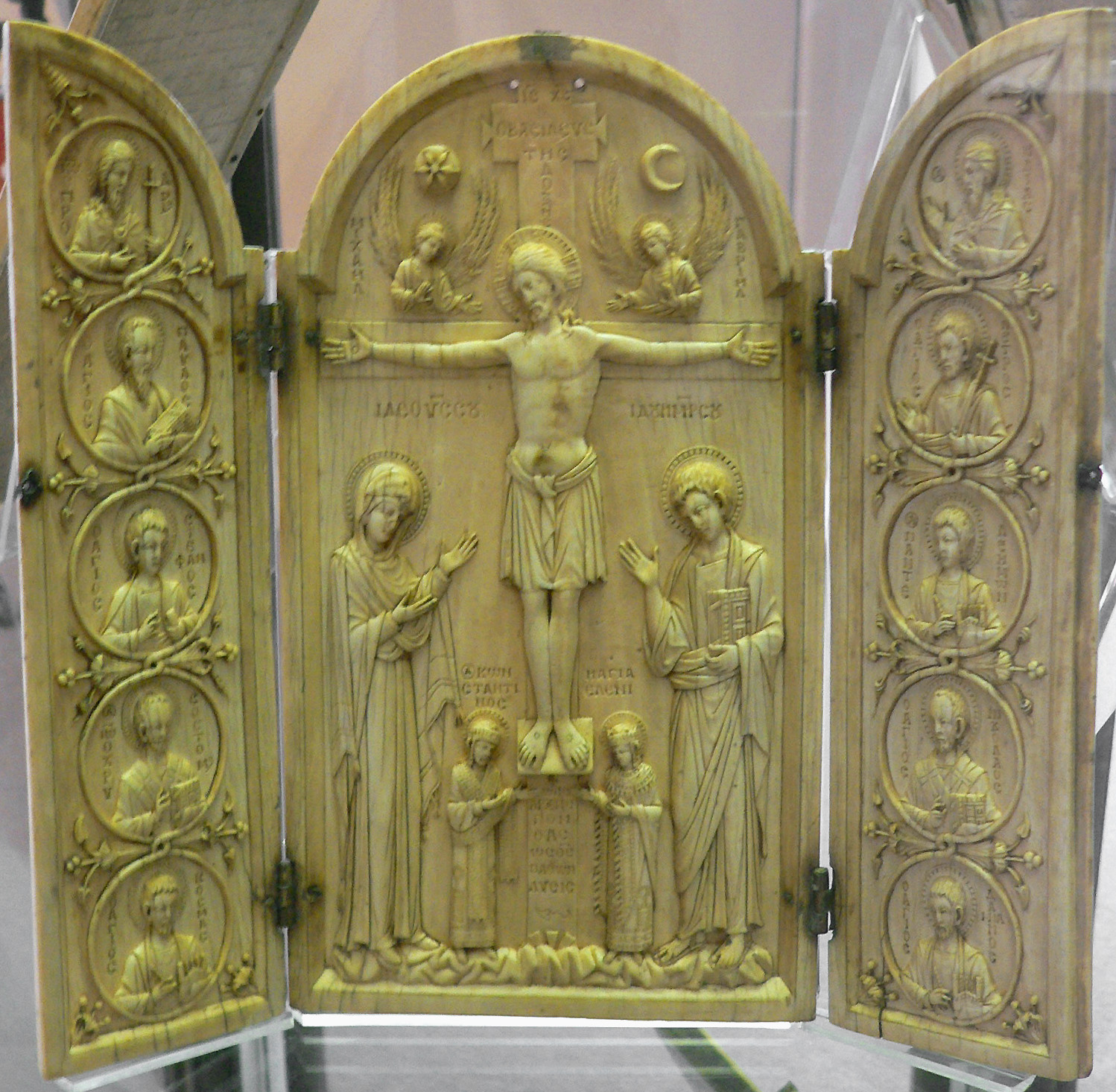 Triptyque d'ivoire Triptyque en ivoire d'éléphant. Crucifixion et saints. Constantinople. 2ème moitié du Xe siècle